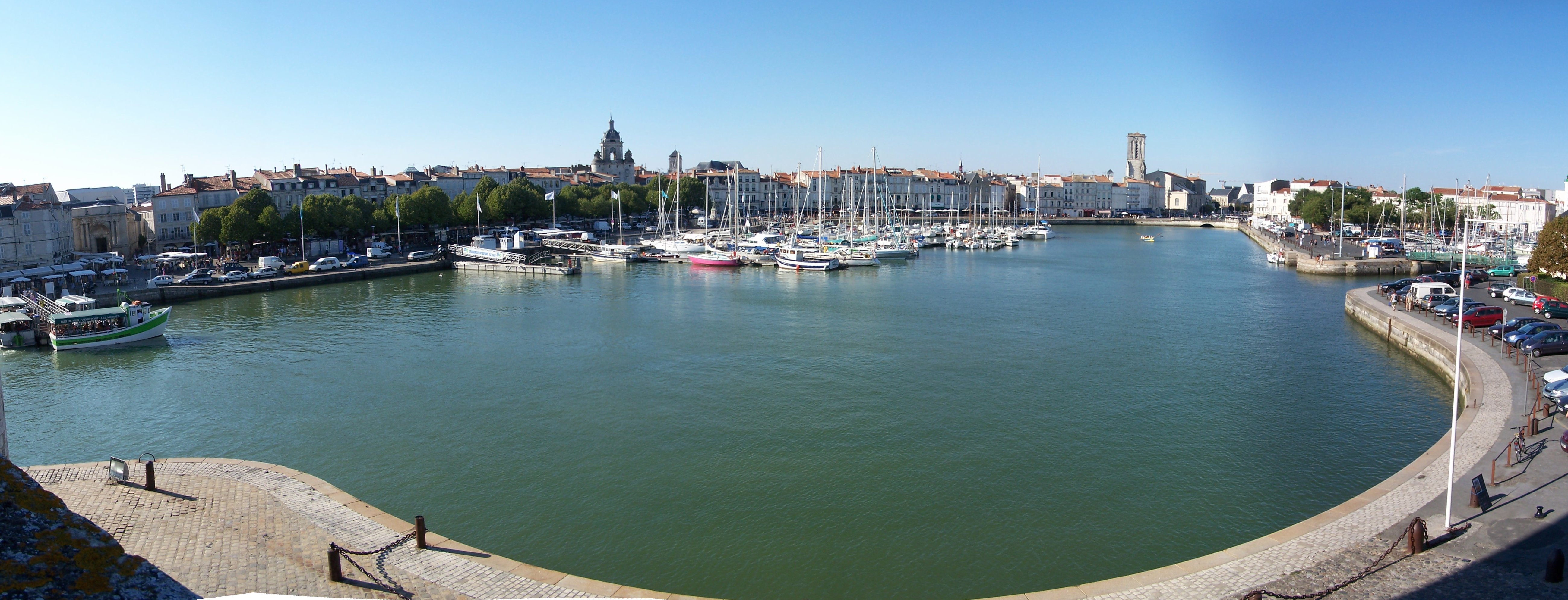 Panoramique du Vieux-Port de La Rochelle, créé avec Hugin et GIMP à partir de photographies personnelles.